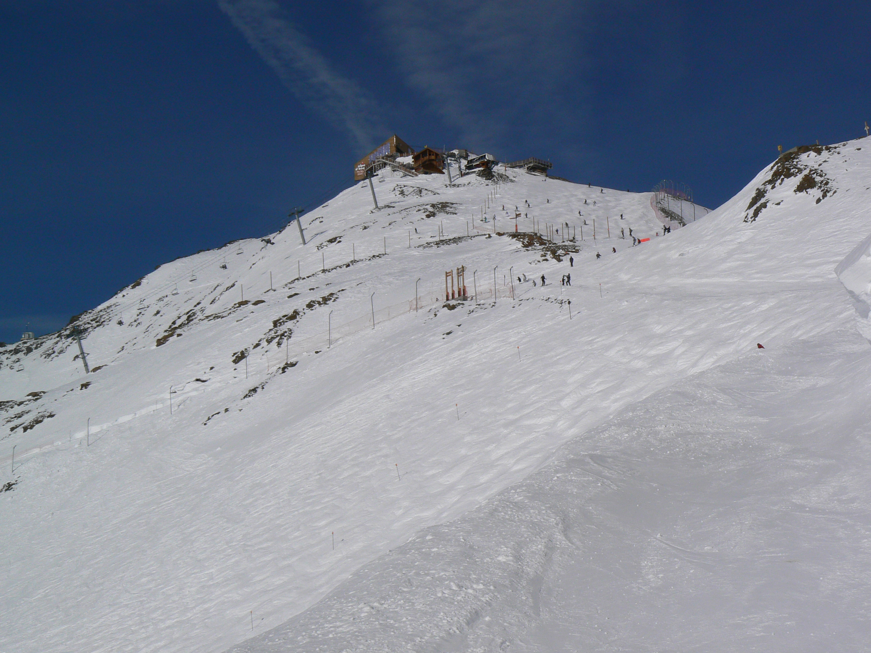 La pista Sarenne del comprensorio Grandes Rousses.